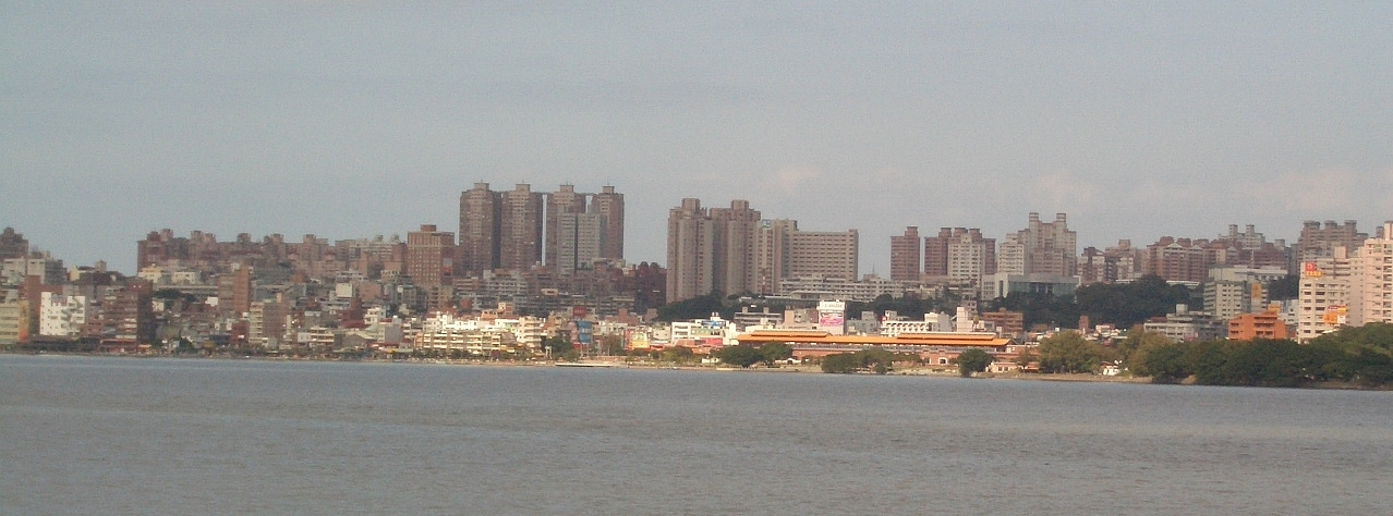 Blick auf Danshui; Mitte: MRT-Station